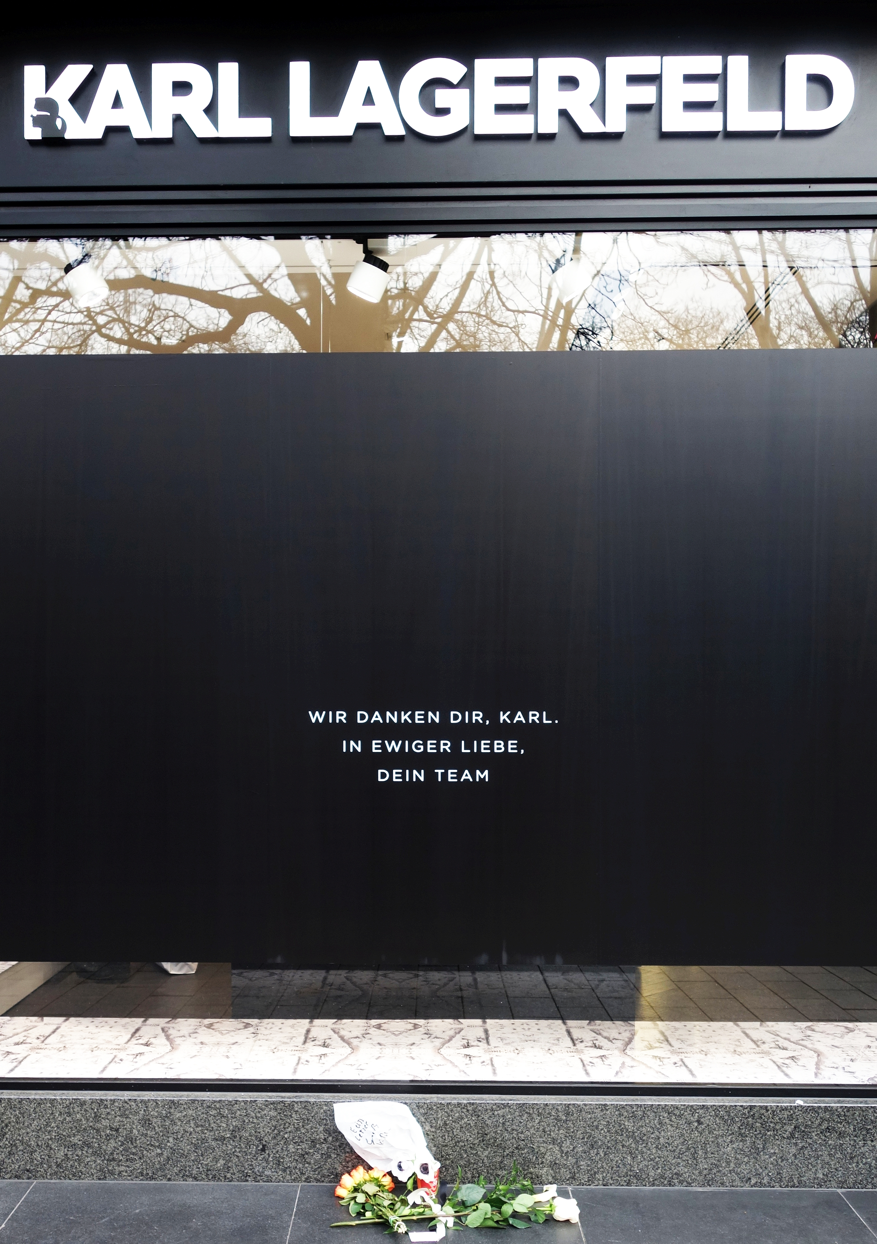 Karl Lagerfeld am Vortag gestorben. Düsseldorf, Königsallee (Februar 2019).